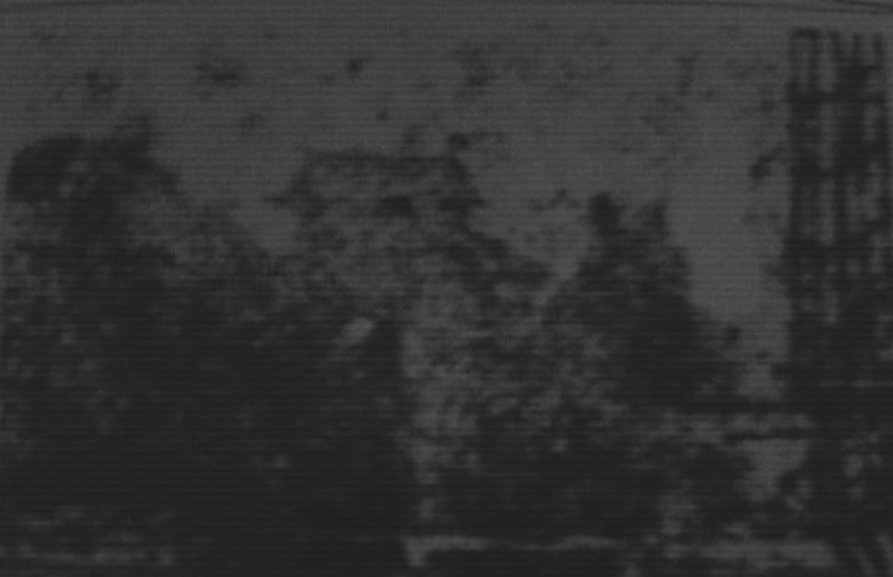 関宿城古写真（明治初年）